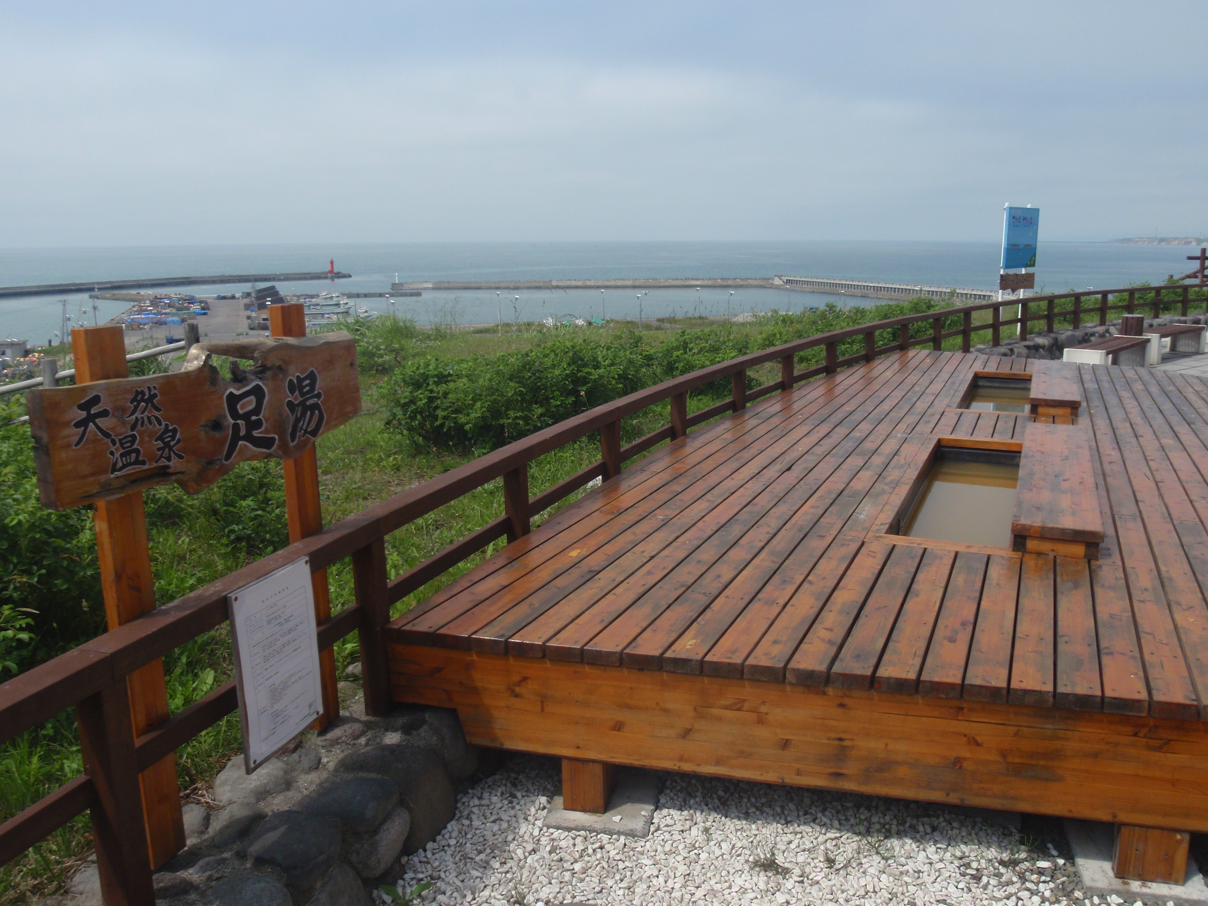 風Ｗとままえにある足湯